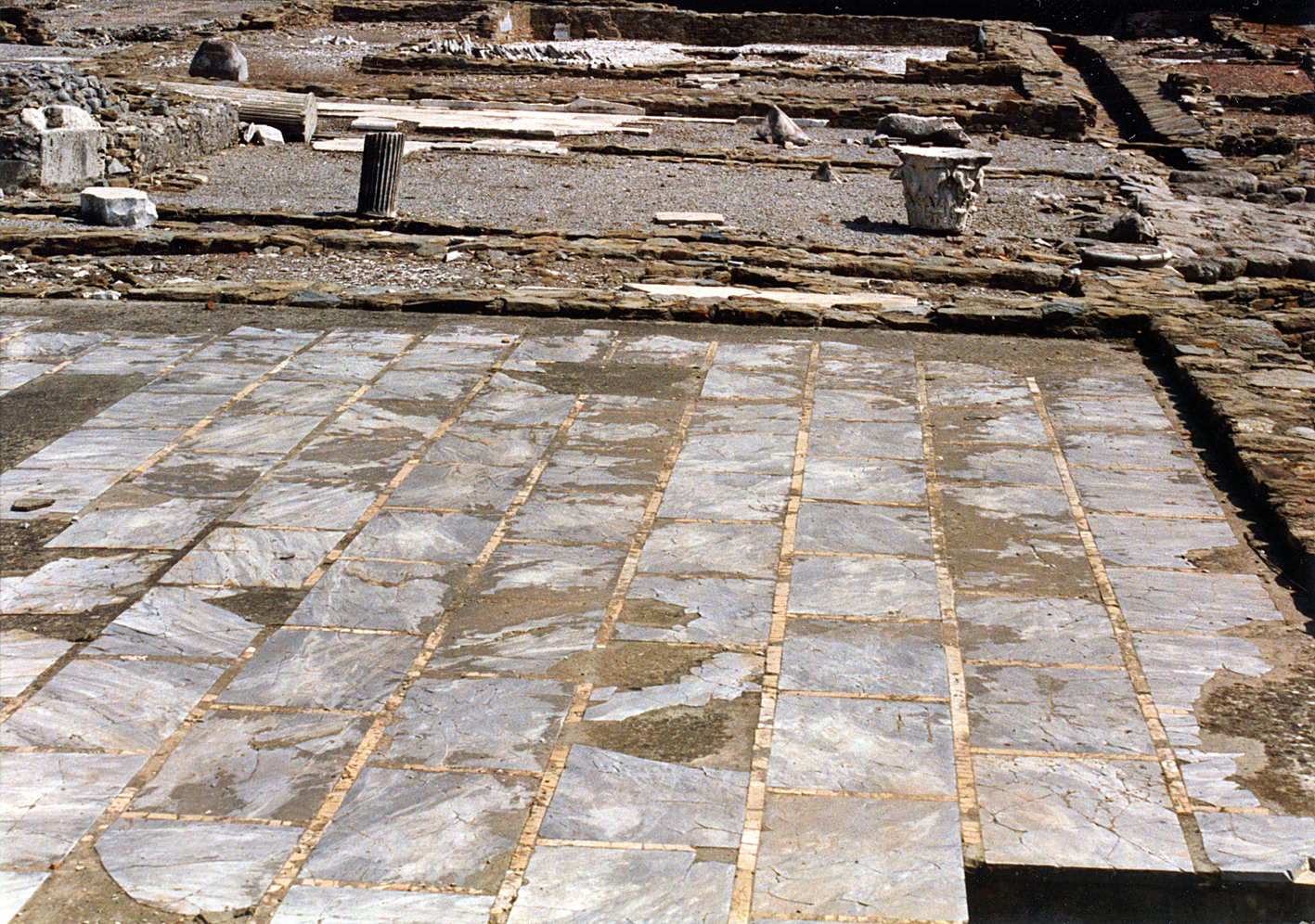 Luna, Forum, Provinz La Spezia, Italien: Erhaltener Marmorboden an der Area publica direkt am südlichen Hauptzugang zum Forum. Ganz rechts sieht man gerade noch den Cardo maximus.